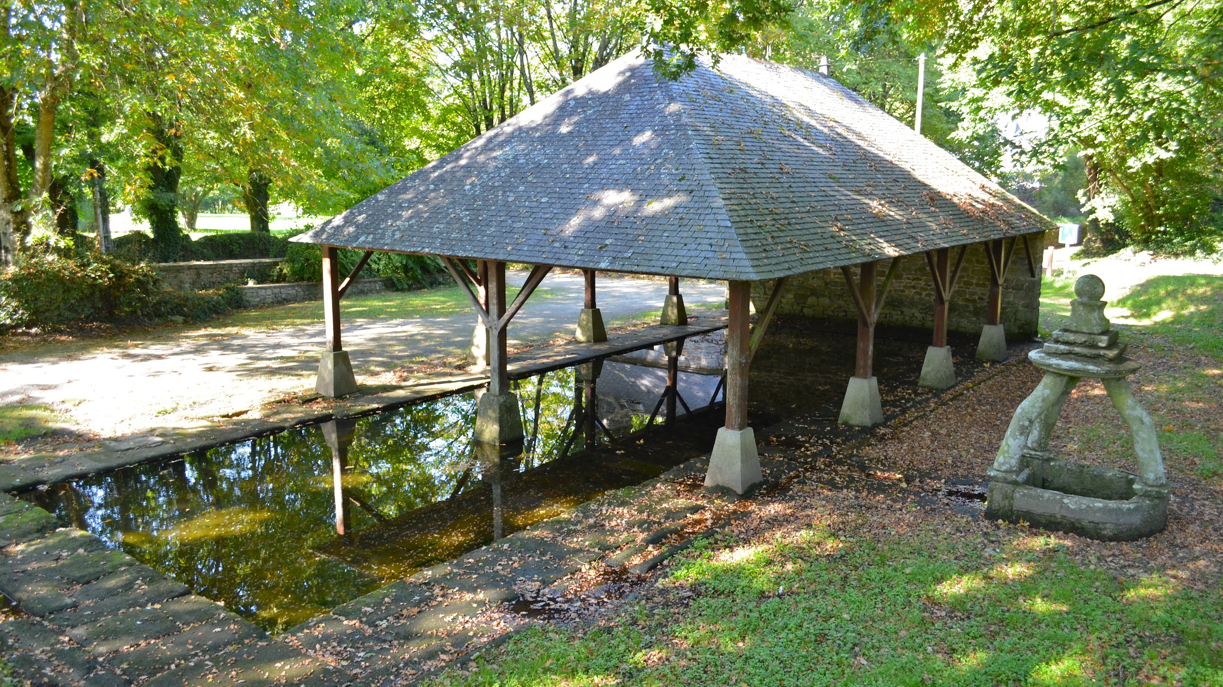 Puits 17e s. près de l'ancien presbytère - Questembert (Morbihan)